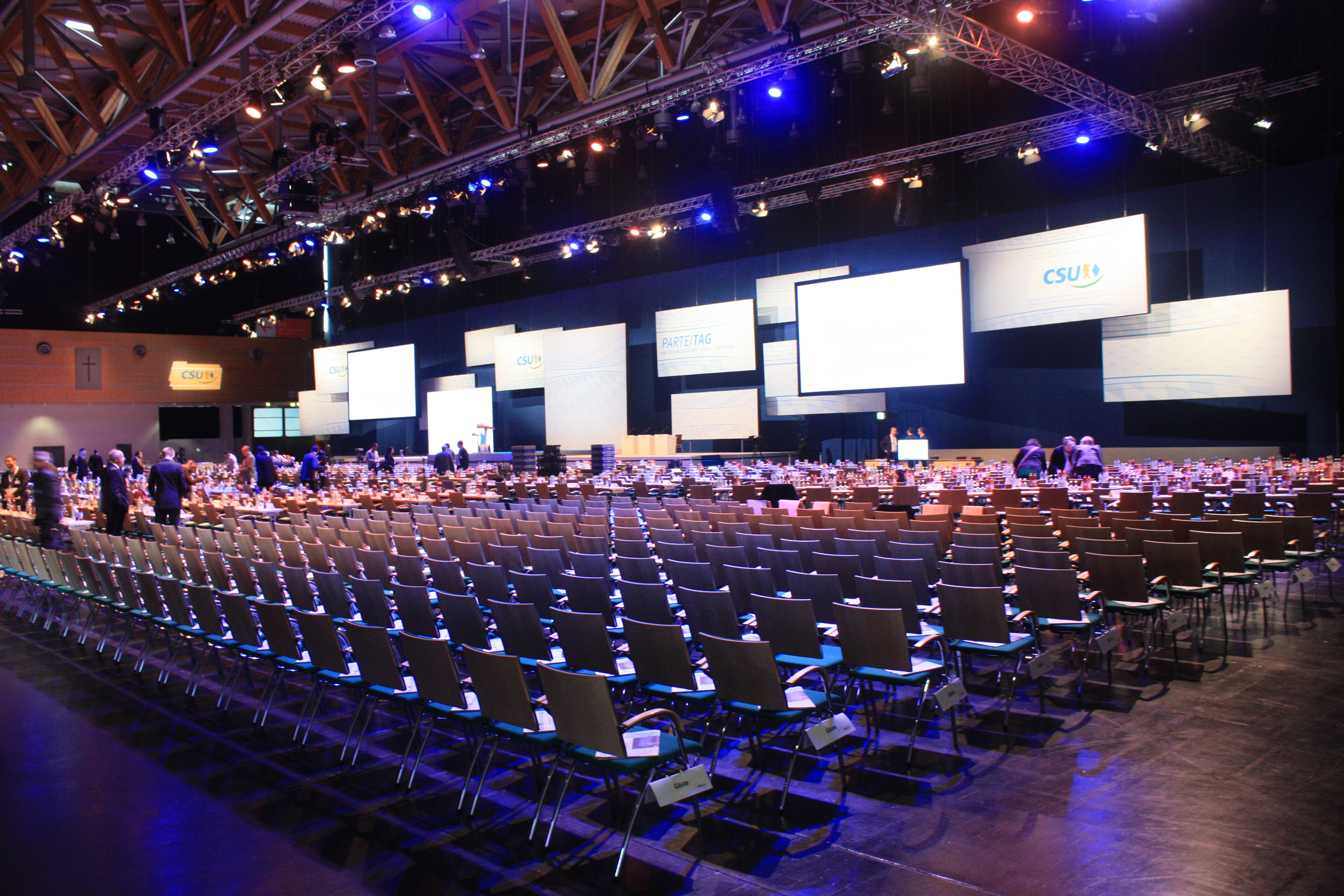 CSU-Parteitag 11./12. Dezember 2014 in Nürnberg